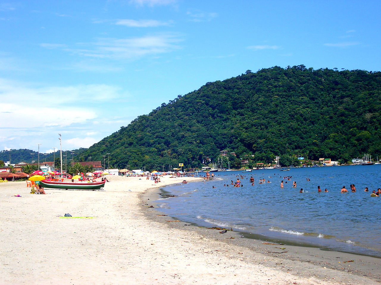 orla de Itacuruçá, Mangaratiba-RJ